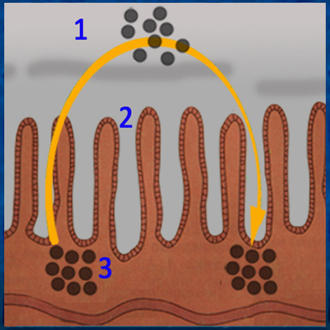 Схема. Метаболиты и токсические вещества секретируются в просвет кишки, а затем вновь реабсорбируются в кишечнике и попадают во внутреннюю среду организма.